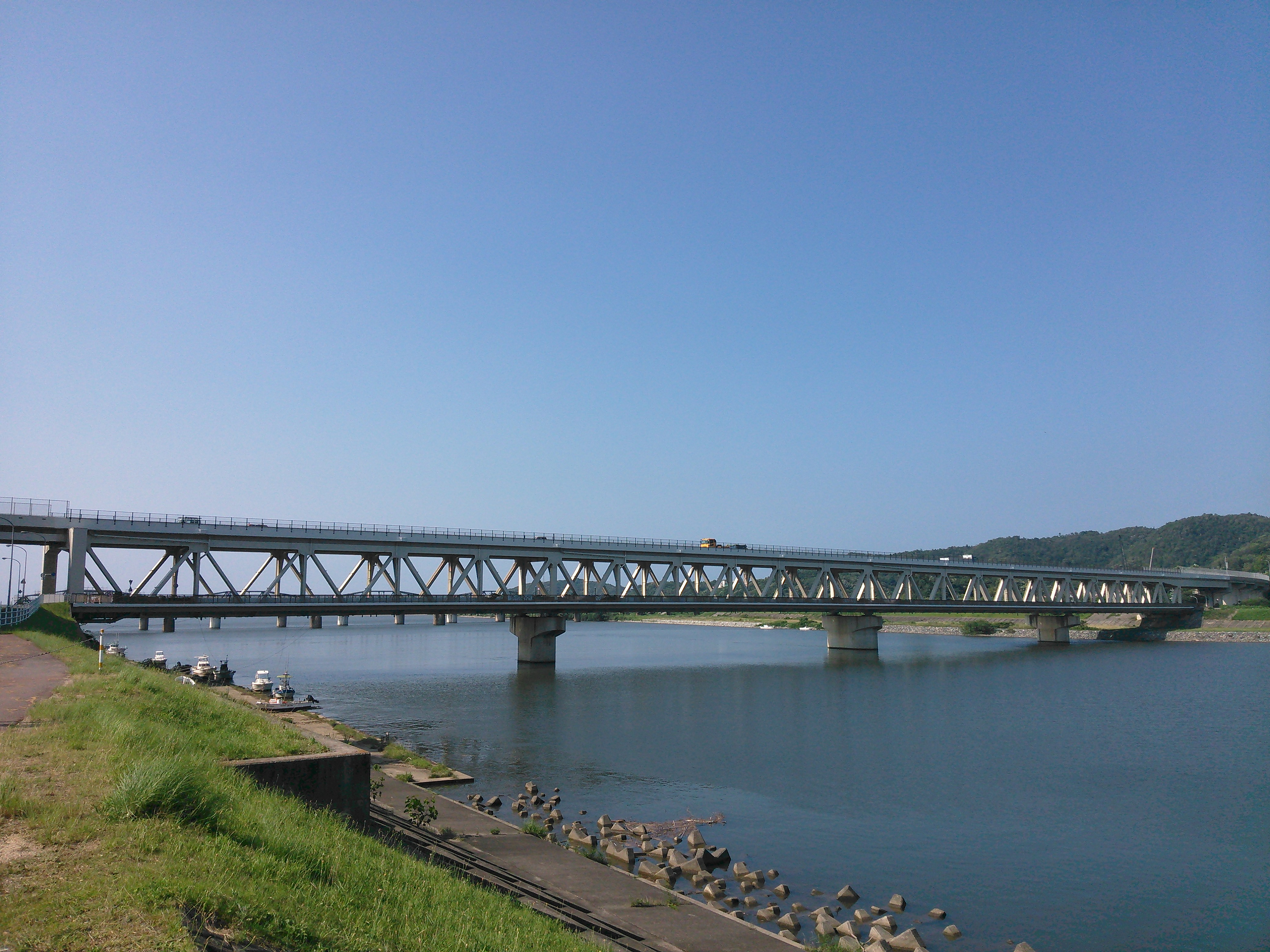 島根県江津市、江の川に架かる新江川橋。上流側左岸より